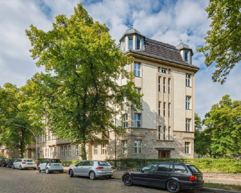 Hohenzollerndamm 125-126 (Berlin-Schmargendorf), Sommer 2017